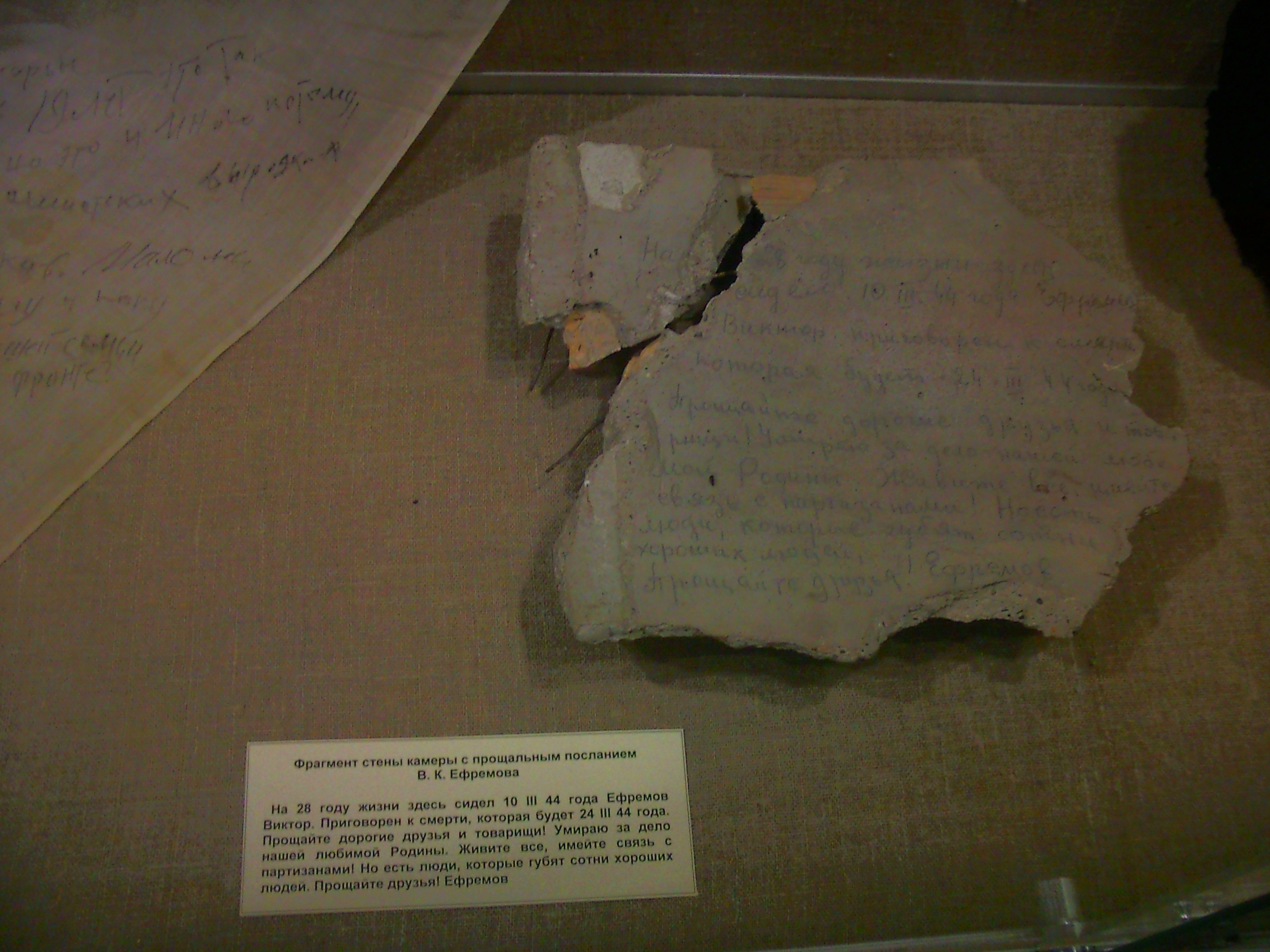 фрагмент стены в гестаповских застенках, на которой за несколько часов до казни Виктор Ефремов написал предсмертные строки